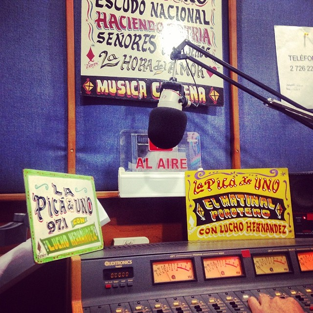 Listos para salir al aire por Radio Uno #reinicio